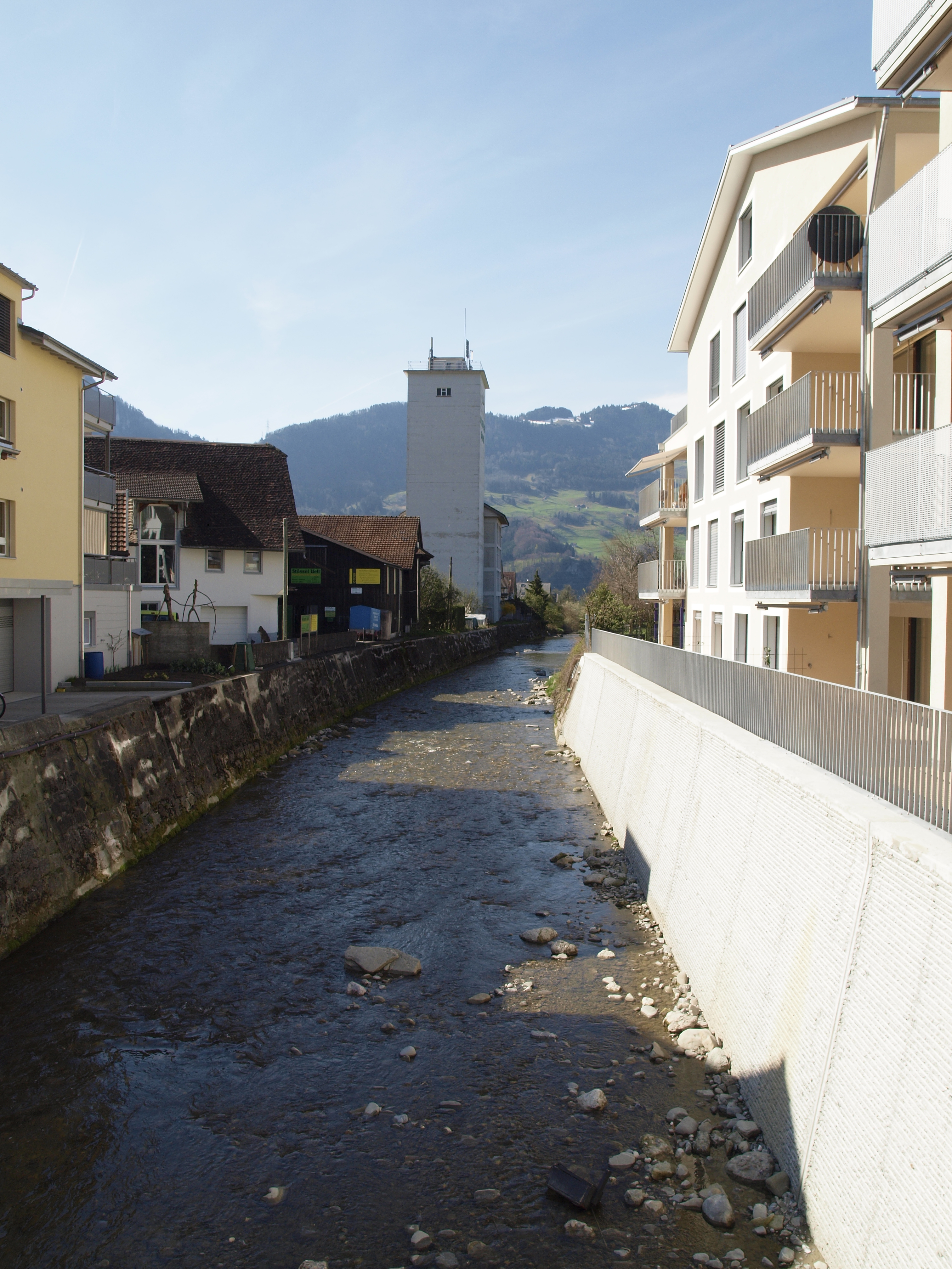 Die Steiner Aa in Steinen SZ